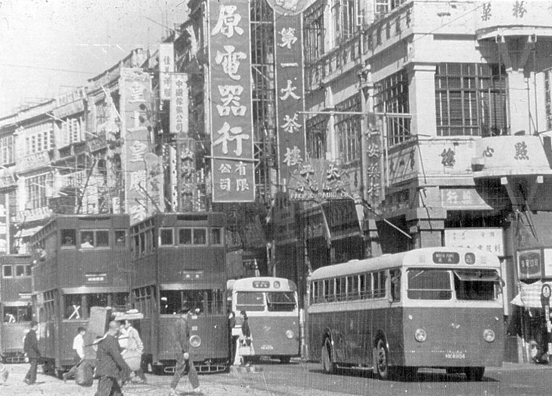 中文（香港）: 1955年香港德輔道中。